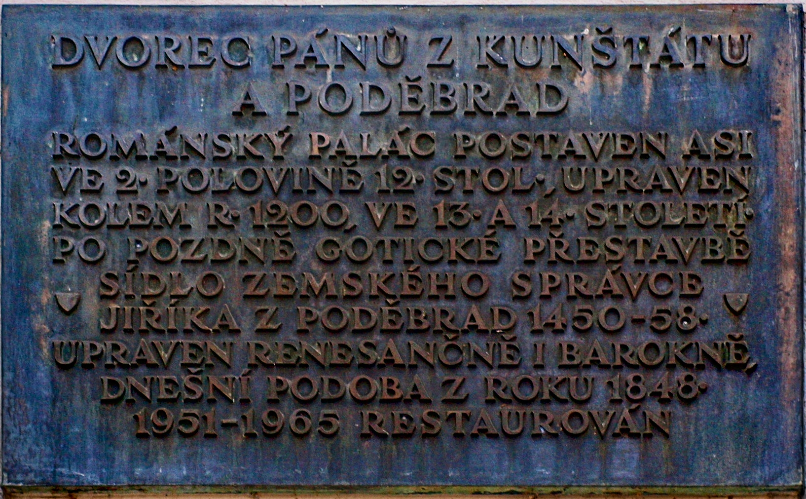 Palác pánů z Poděbrad - deska